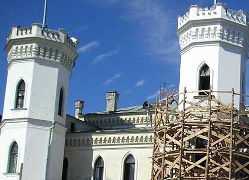 Палац у Шарівці Богодухівського району: Фрагмент палацу у смт Шарівка